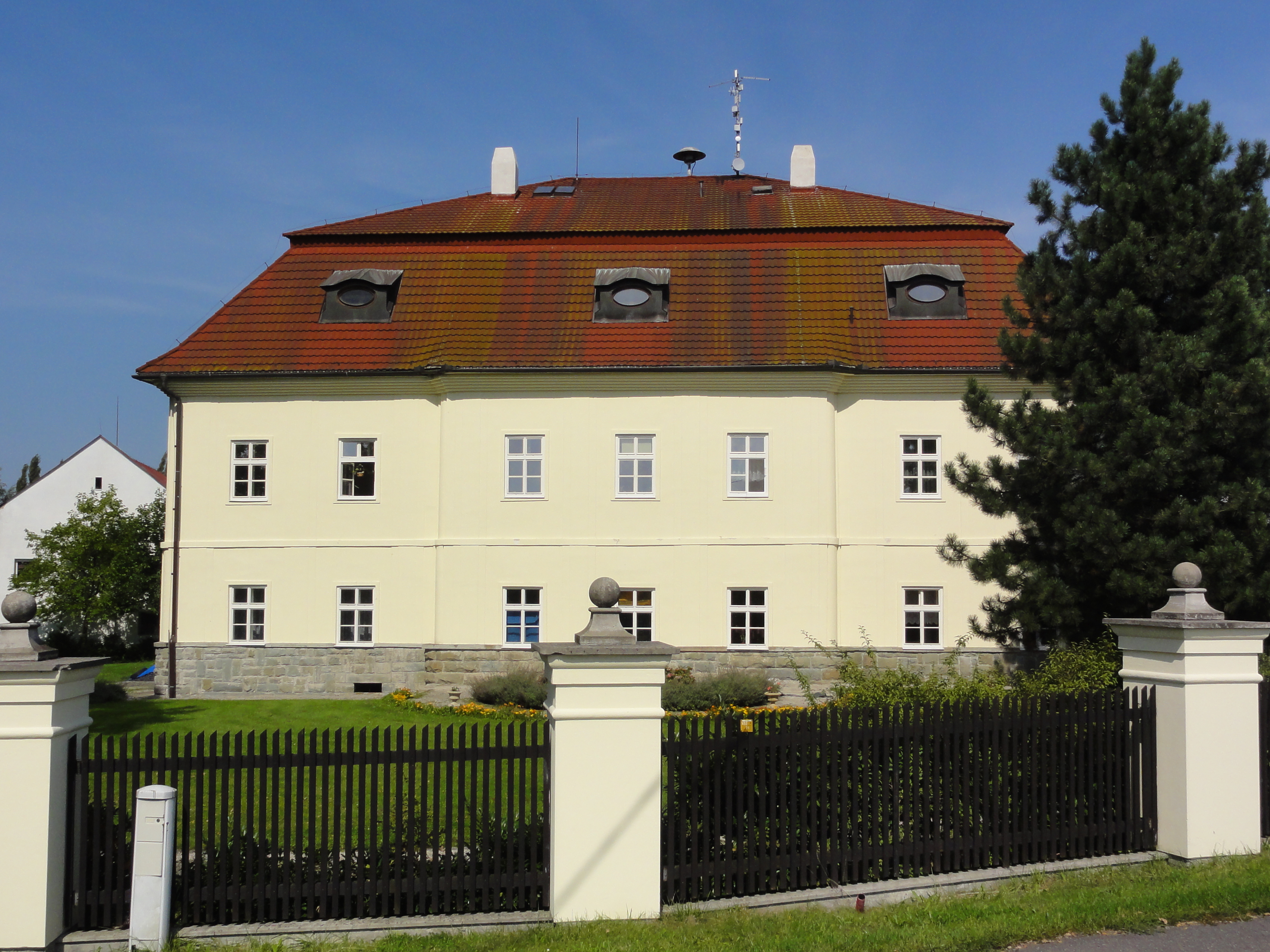 Zámek Horní Tošanovice